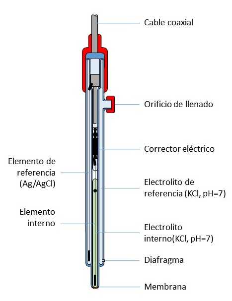 Electrodo de vidrio para medición de pH en laboratorio.